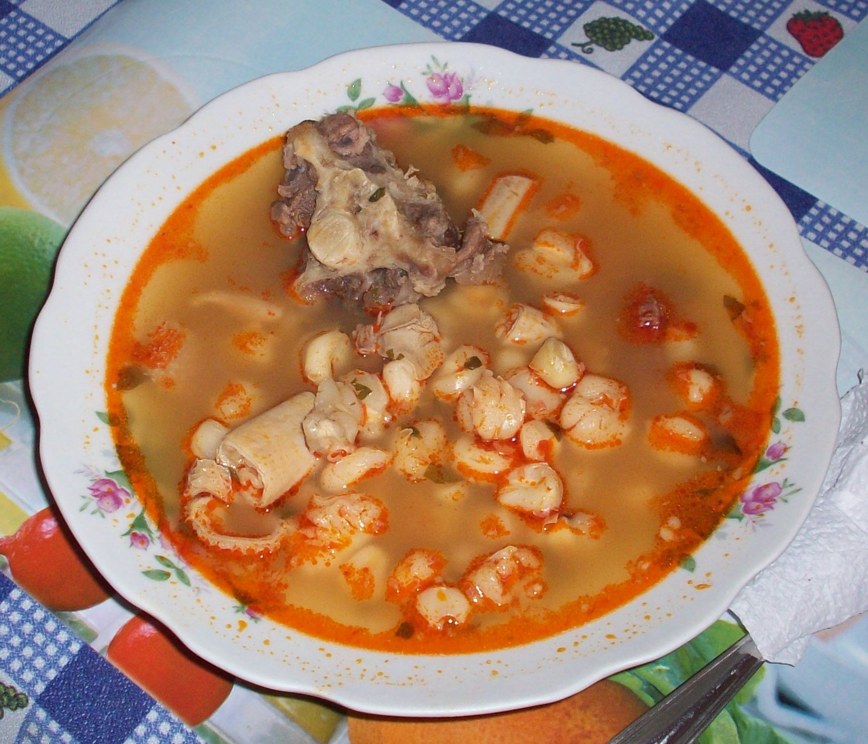 Mondogo o Patasca de ocaña peru